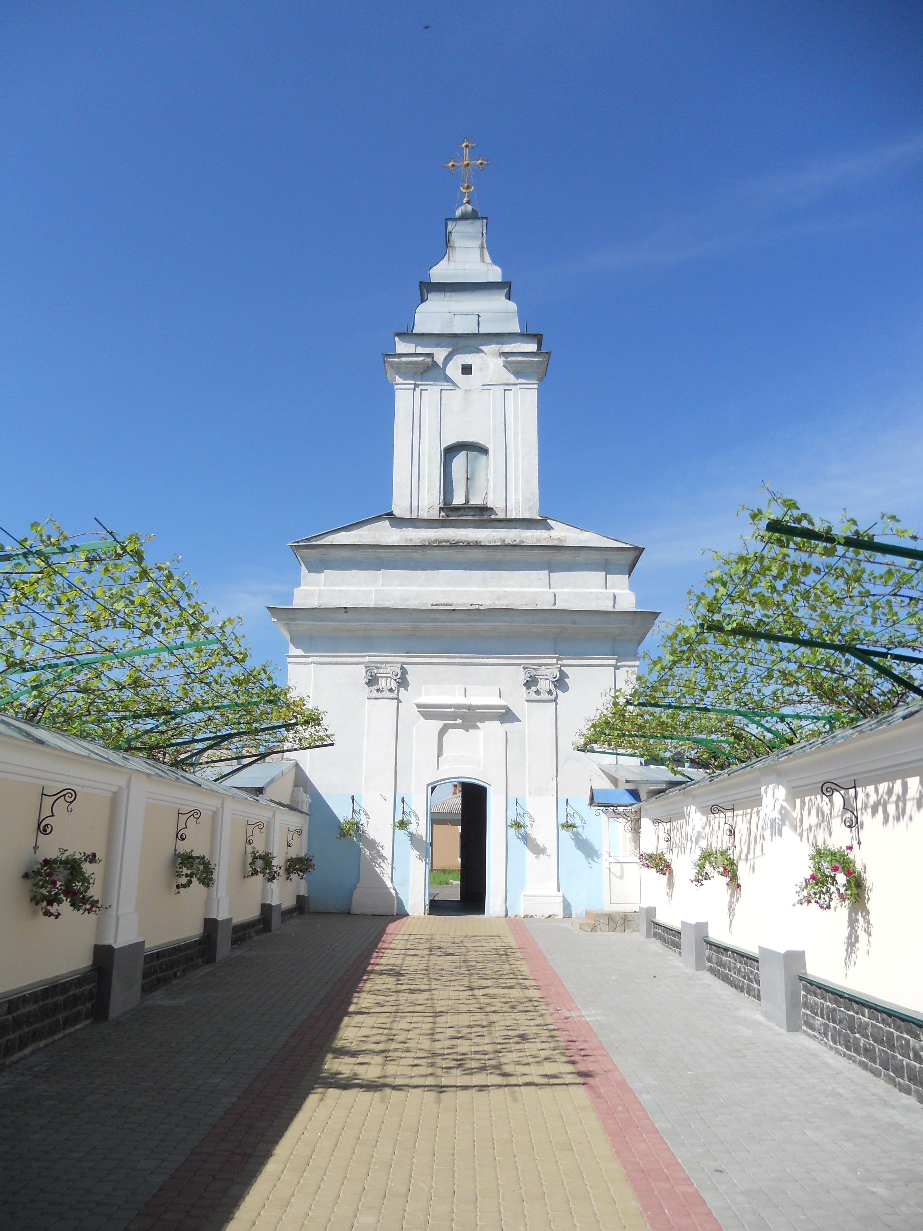 Вежа-дзвіниця Межиріцького монастиря з двору.